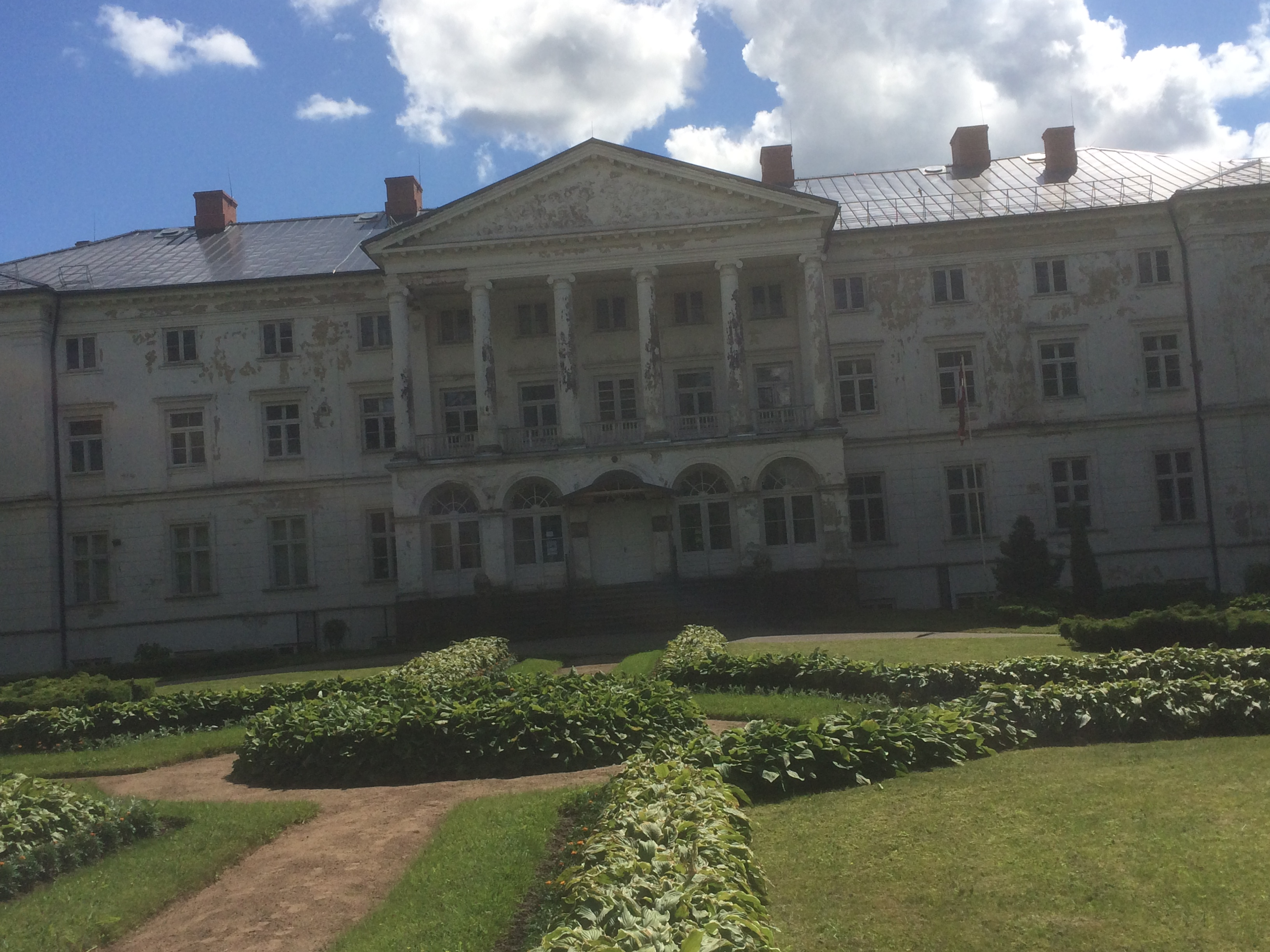 gaujienas pilsmuižas kungu māja